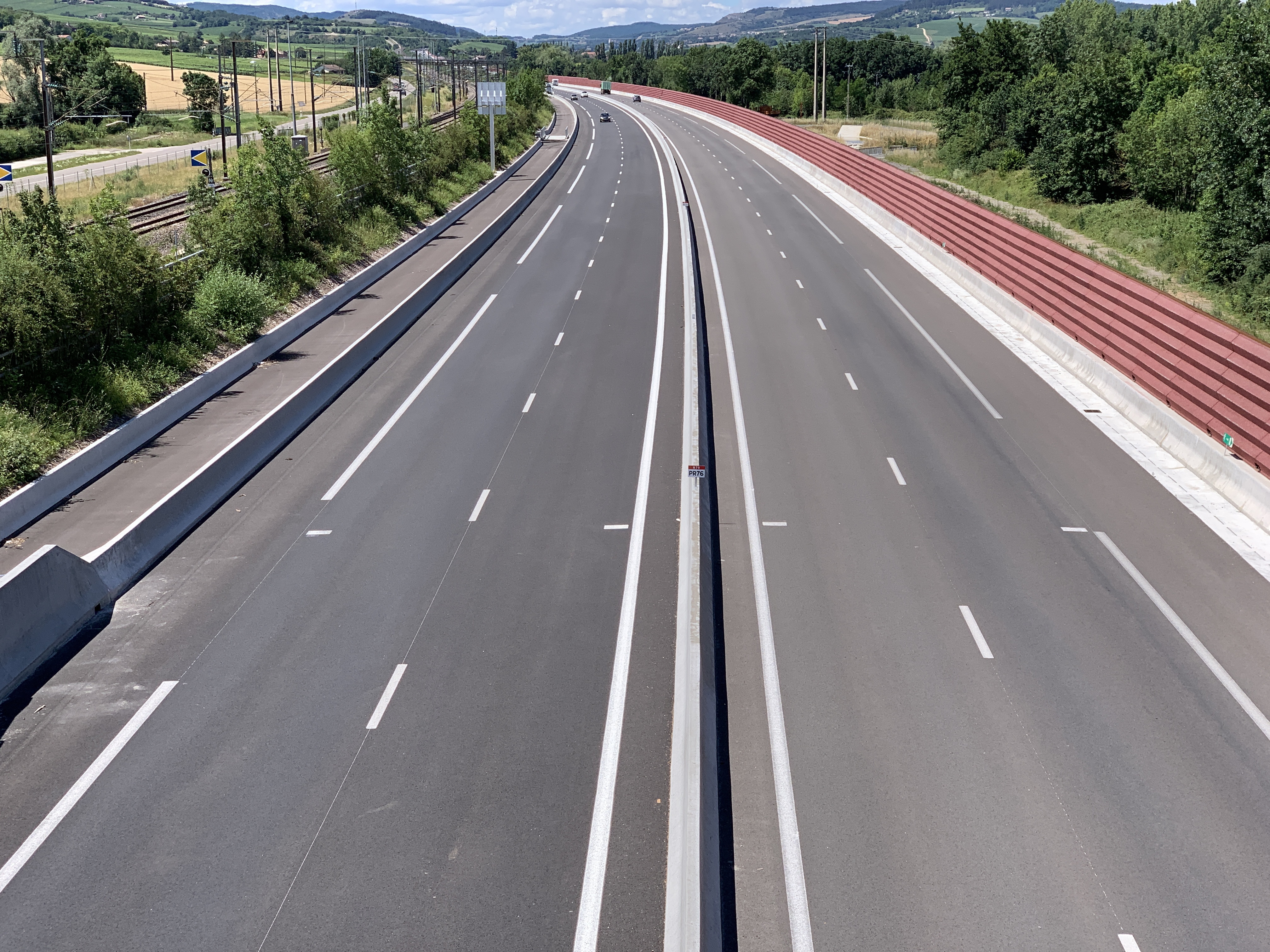 La route nationale 79 vue depuis le pont de la route départementale 54, Davayé.